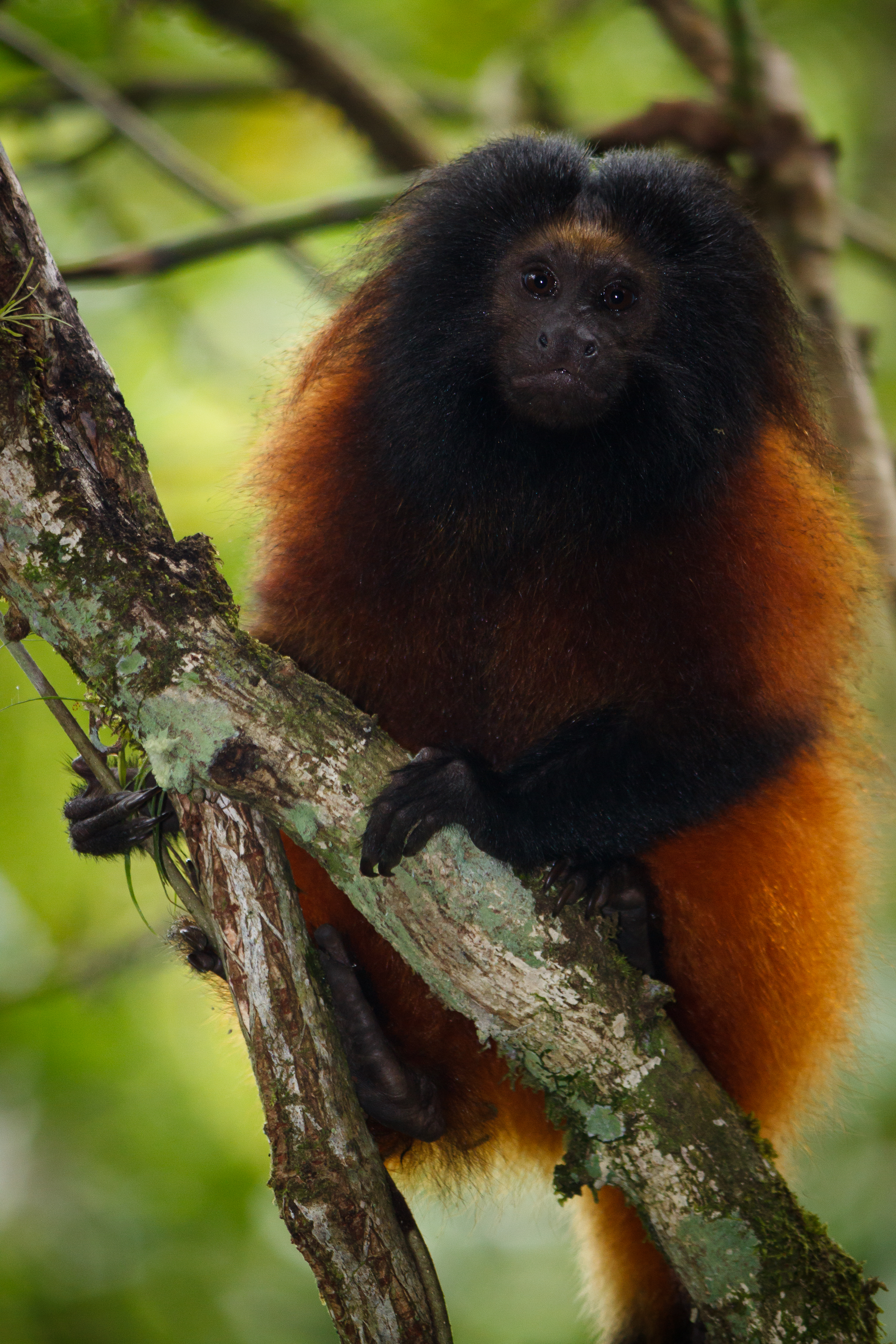 Leontopithecus caissara (Lorini & Persson, 1990); Critically Endangered (IUCN 2003)